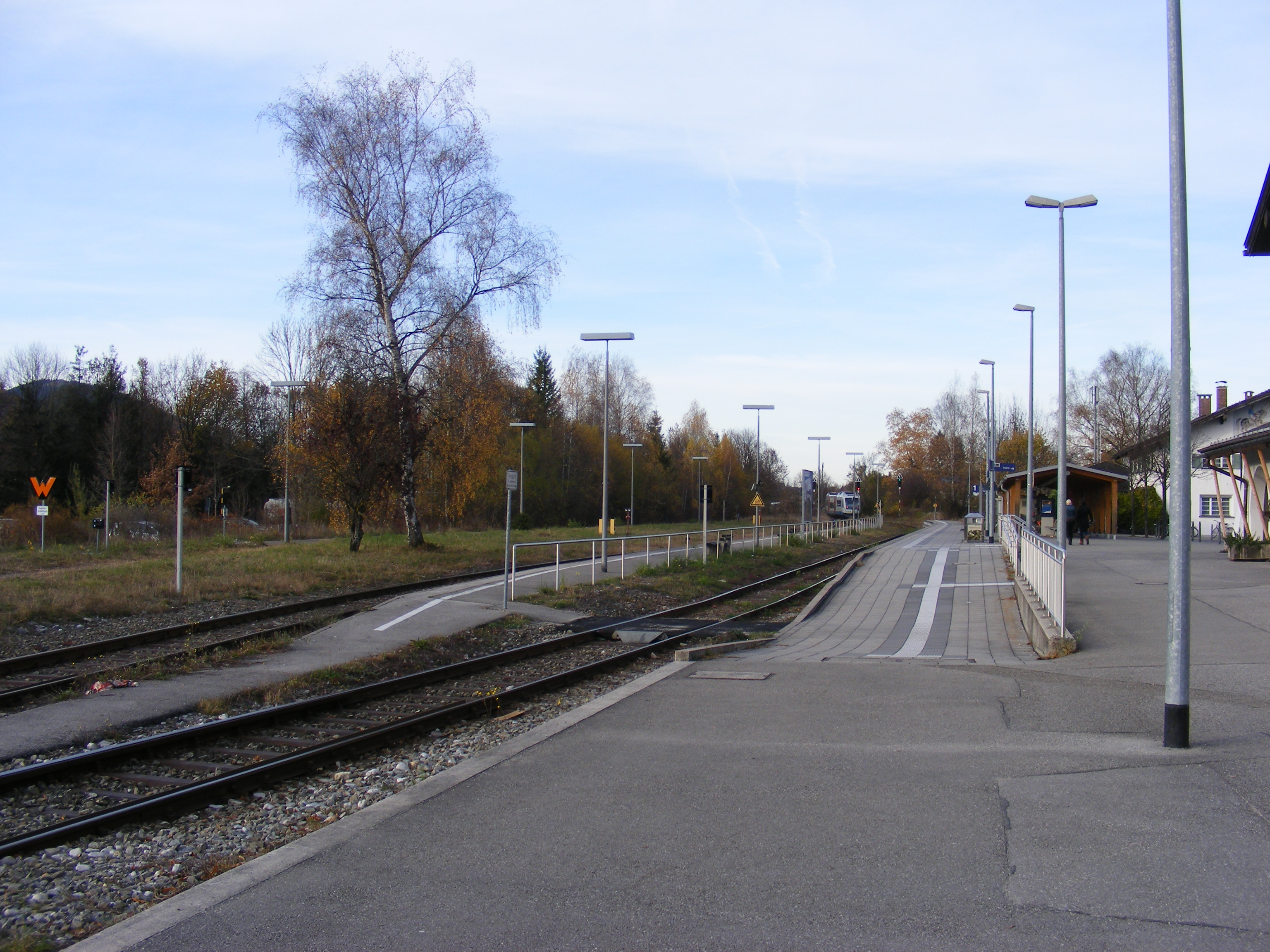 Bahnhof Lenggries der DB Netz AG mit Blick nach Norden, derzeit nur von der Bayerischen Oberlandbahn genutzt.